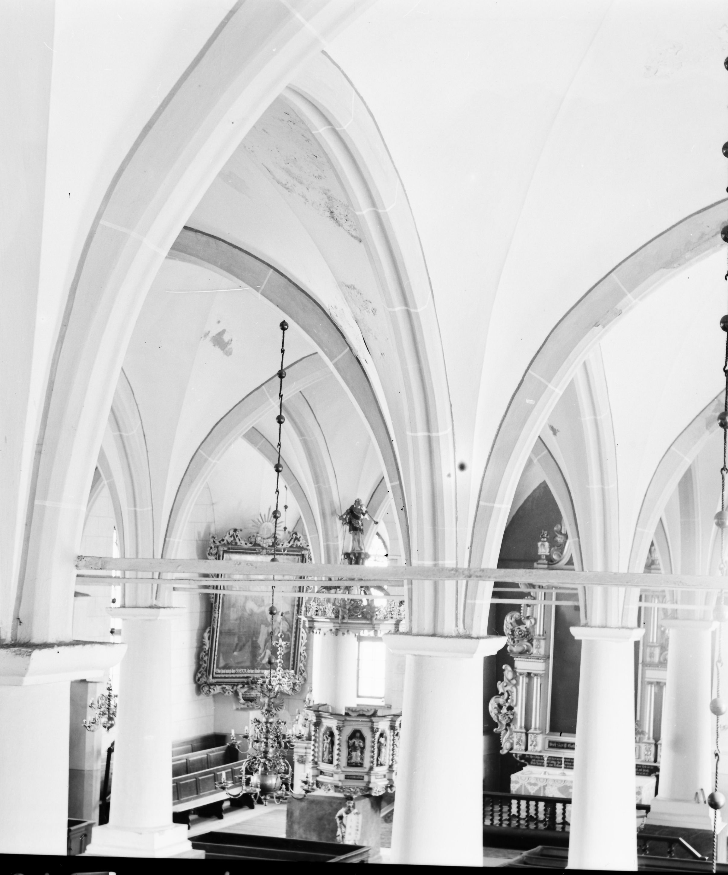 Muuseumikogu Negatiivide kogu Muuseumikogu Negatiivide kogu linnaelu Ehitatud 1641 - 1651, arhitekt H. Skrintner, Z. Hoffmann. Vaade sammaste vahelt kantslile; Eesti Narva